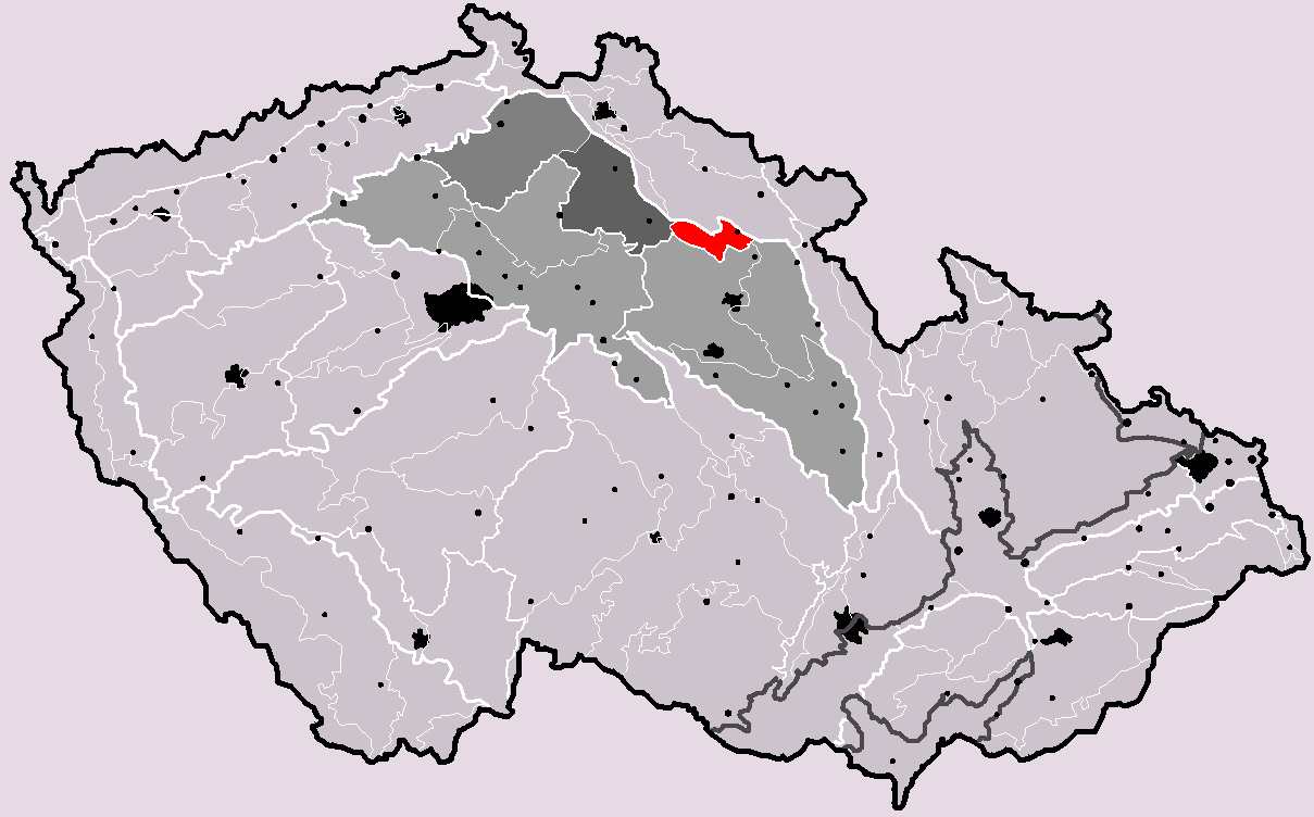 Poloha geomorfologického podcelku Bělohradská pahorkatina v rámci České republiky. Hercynský systém Hercynská pohoří I Česká vysočina I6 (VI) Česká tabule I6A (VIA) Severočeská tabule I6A-2 (VIA-2) Jičínská pahorkatina (VIA-2B) Bělohradská pahorkatina